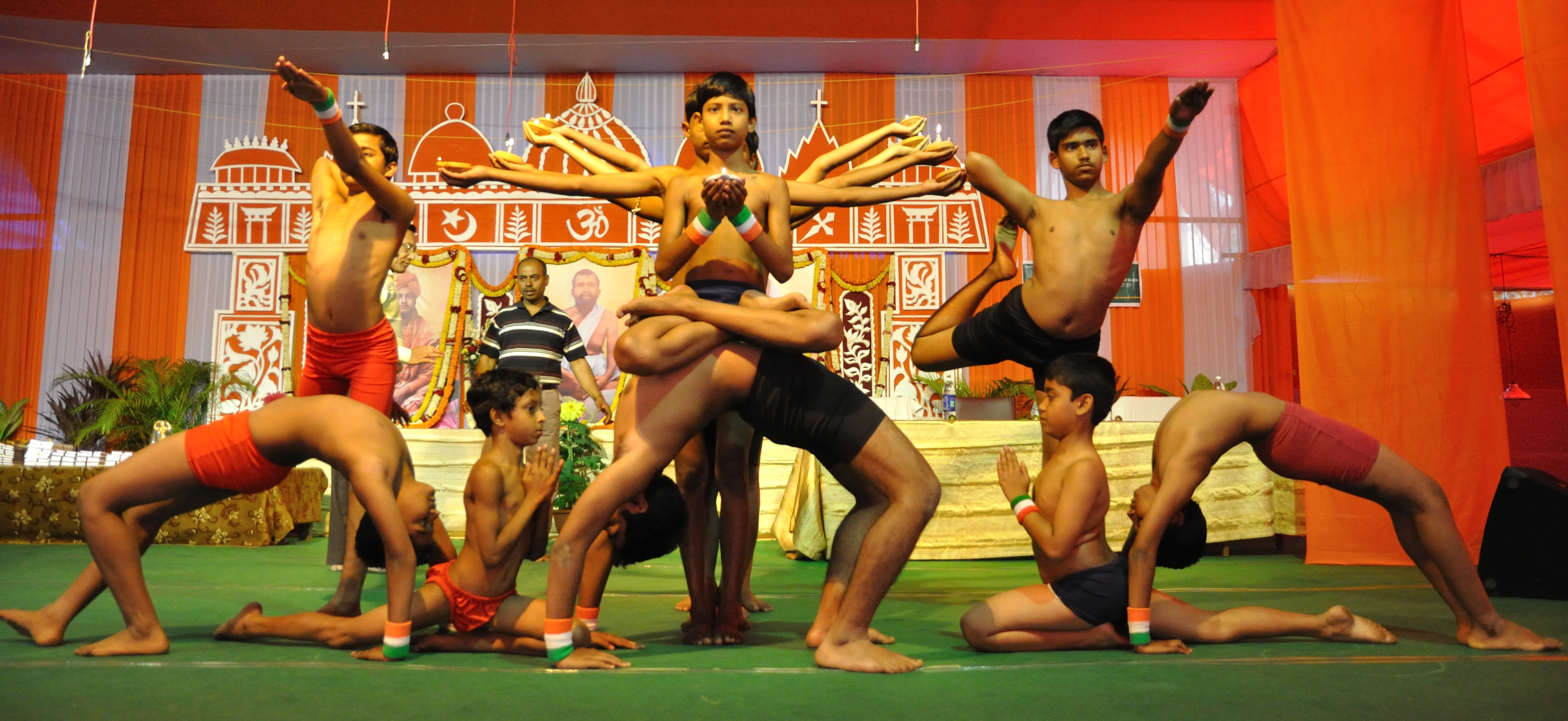 Photographed in Kolkata